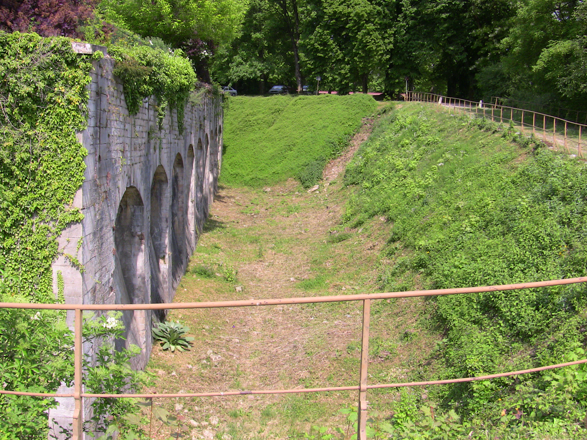 L'avant du fort de Beuregard à Besançon (Doubs, France).